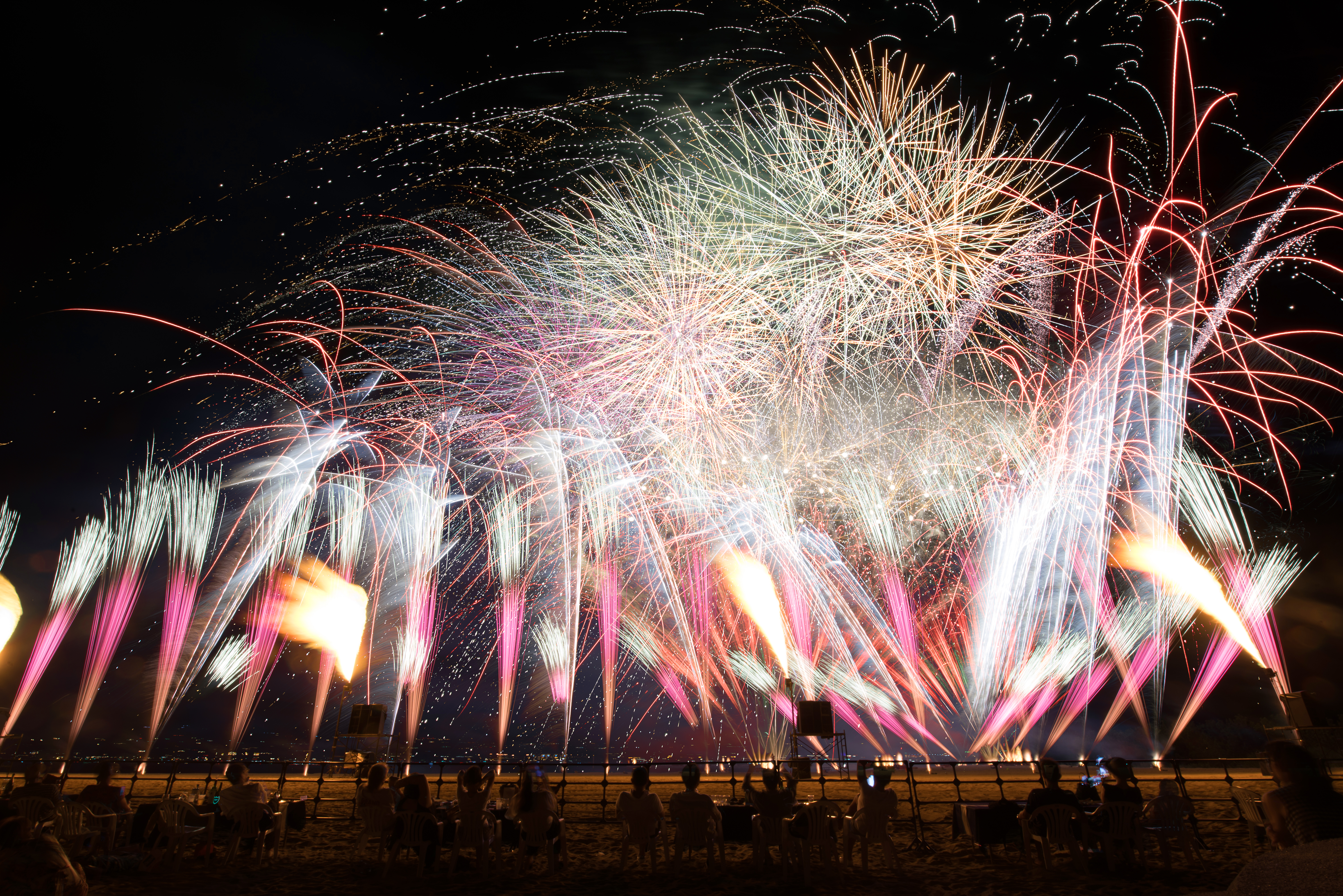 芦屋サマーカーニバル(2017年、潮芦屋ビーチ)